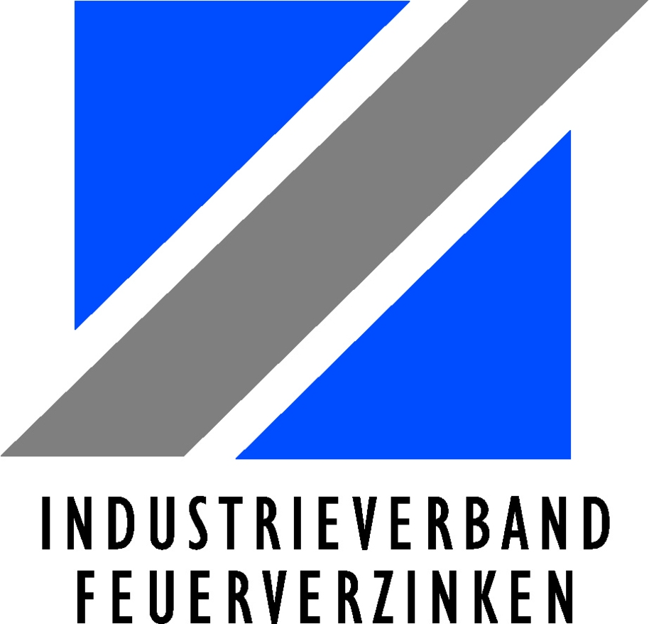 Logo von Industrieverband Feuerverzinken e.V.